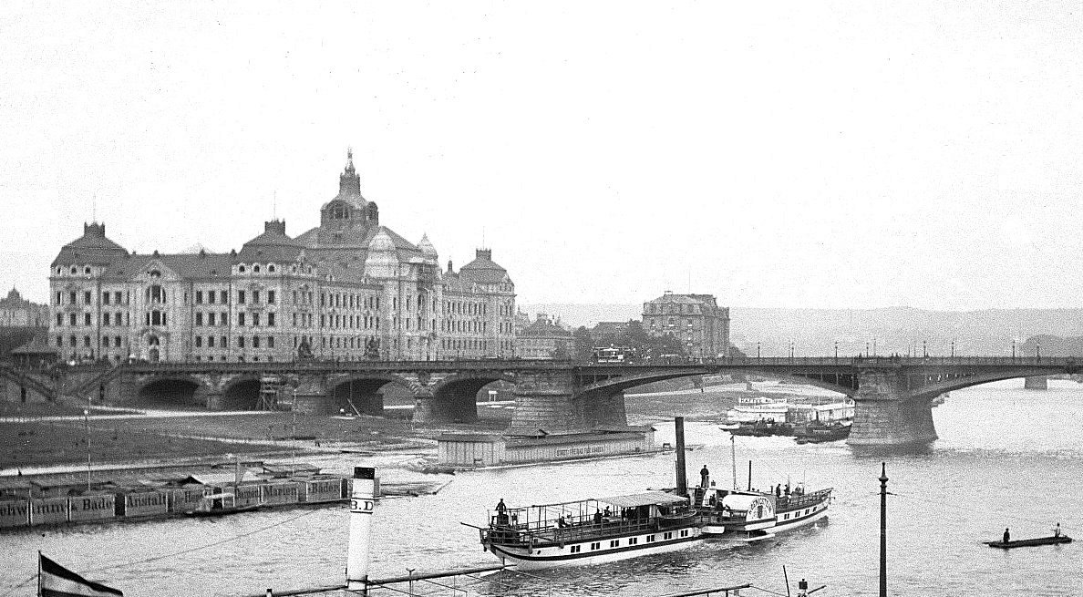 Raddampfer Koenigstein (Königstein (Schiff, 1889)) vor der Carolabrücke.